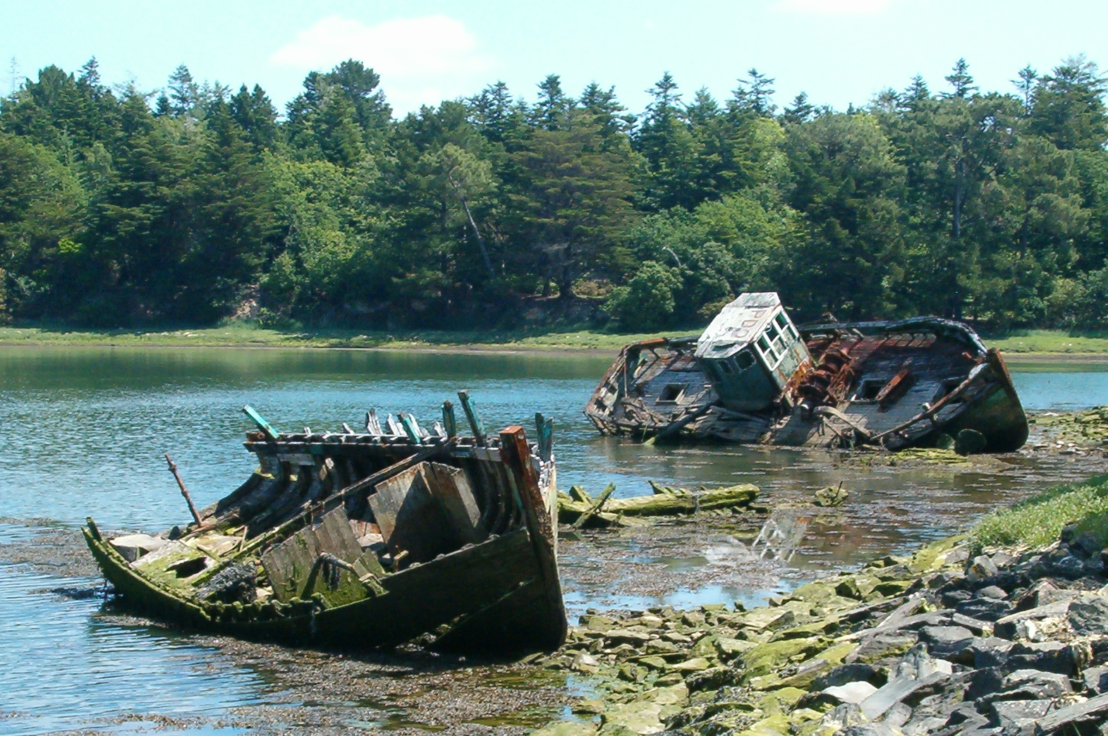 Épaves dans l'anse de Penfoul (anse annexe de l'Odet) à Bénodet.